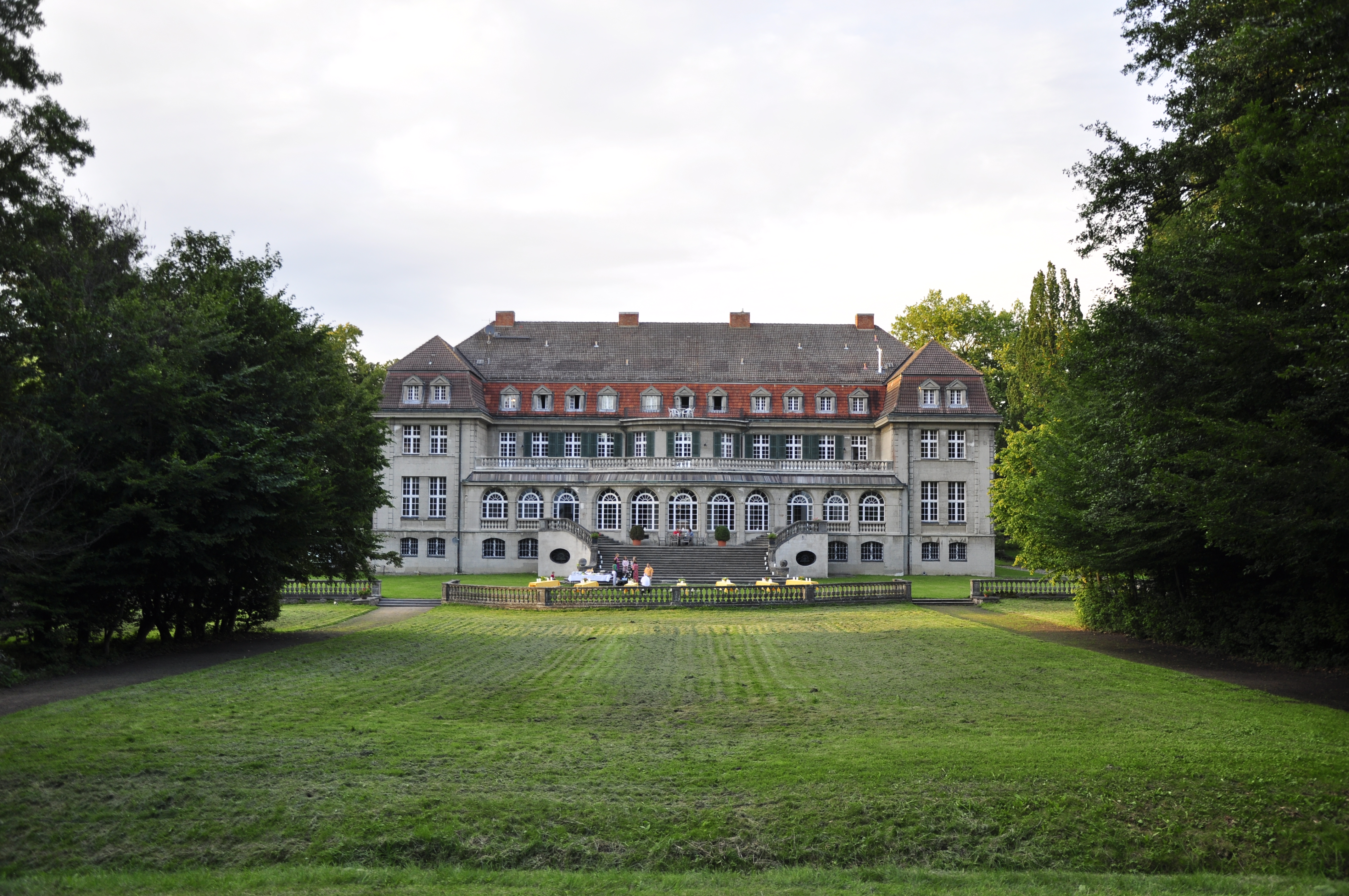 Schloss Bellin, Parkseite